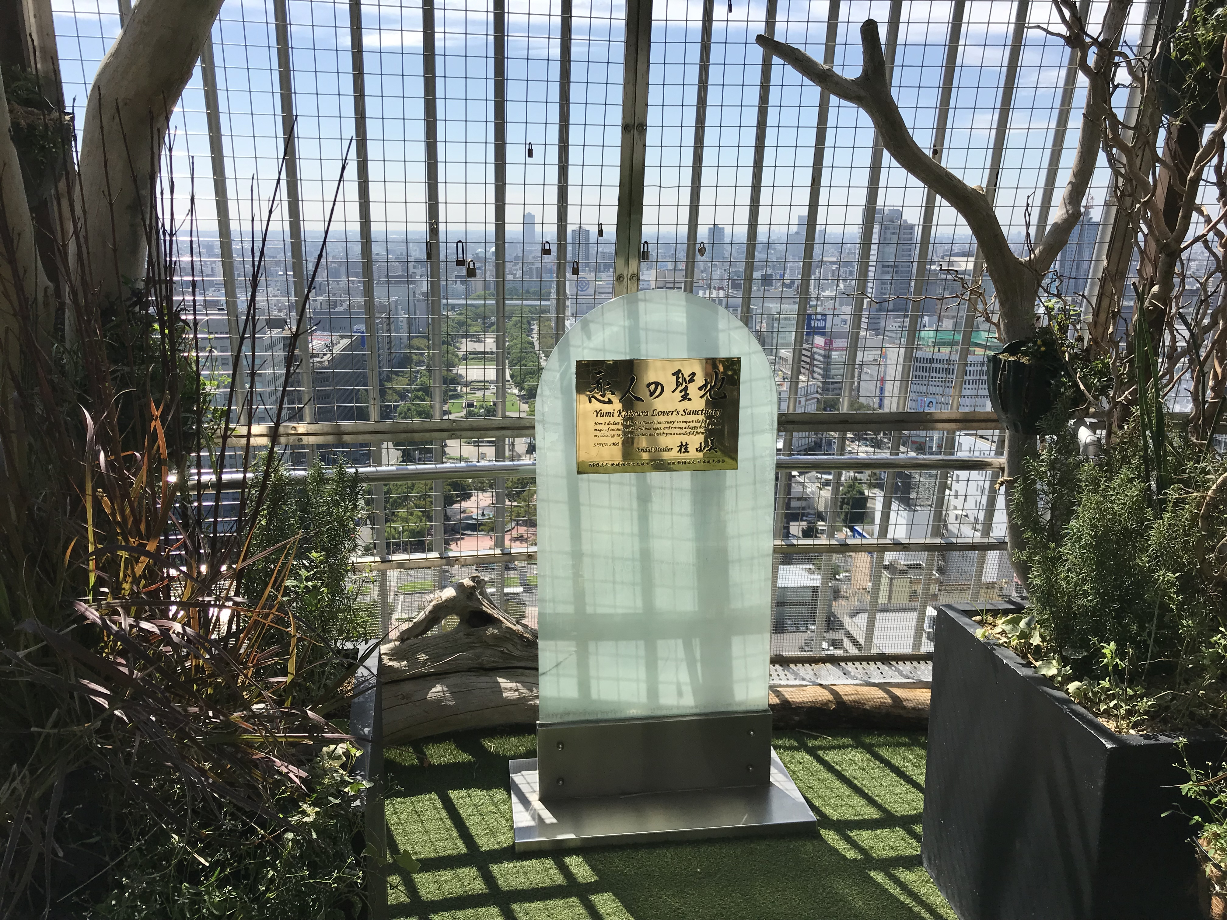 名古屋テレビ塔の最上階展望台にある「恋人の聖地」認定の記念碑。